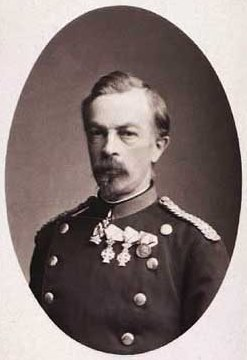 Henrik Glahn (1827-1886), Danish general